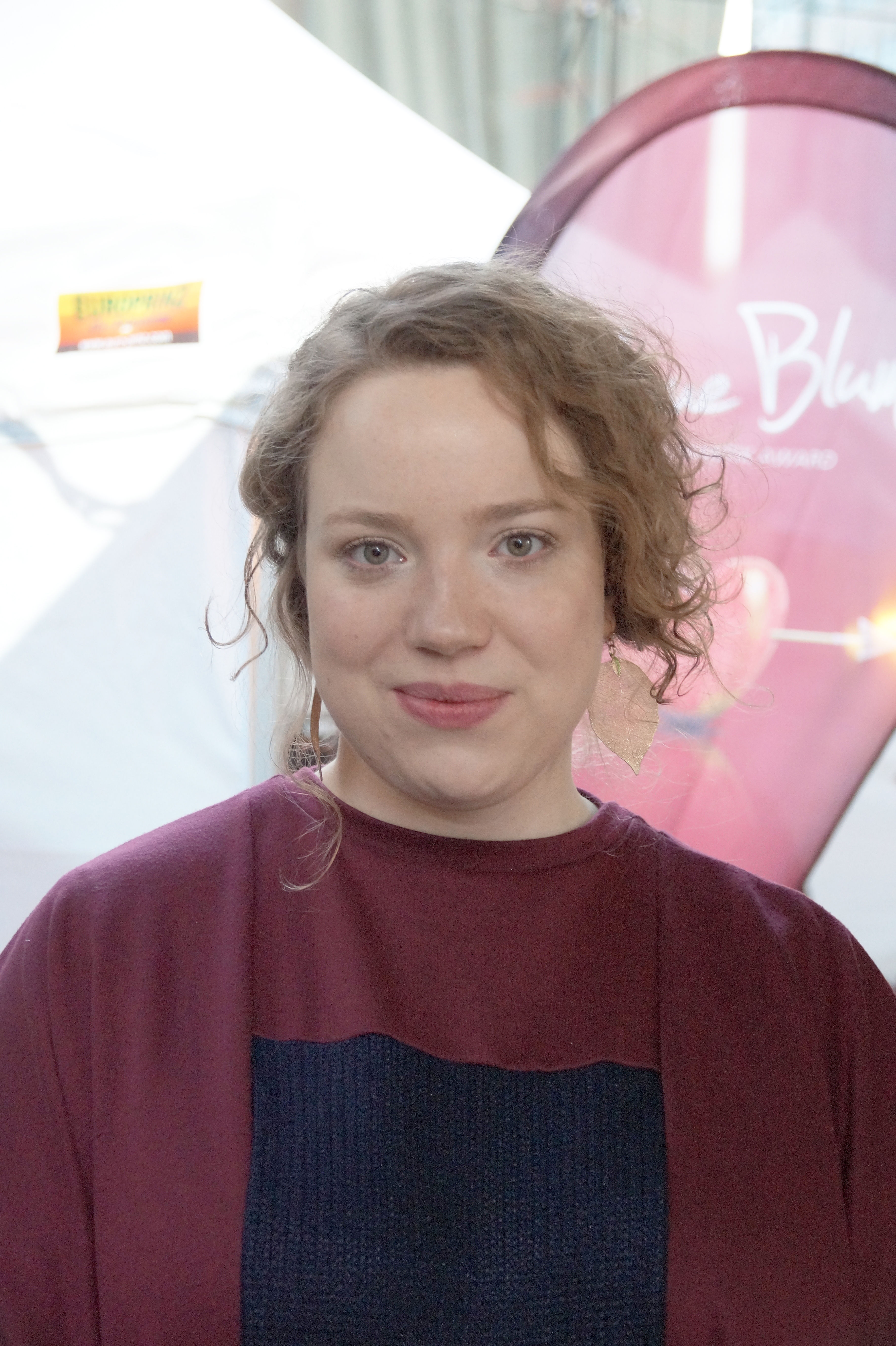 Julia Jendrossek bei der Verleihung des Kurzfilmpreises "Blaue Blume", am 10.02.2016, im Sony Center Berlin.